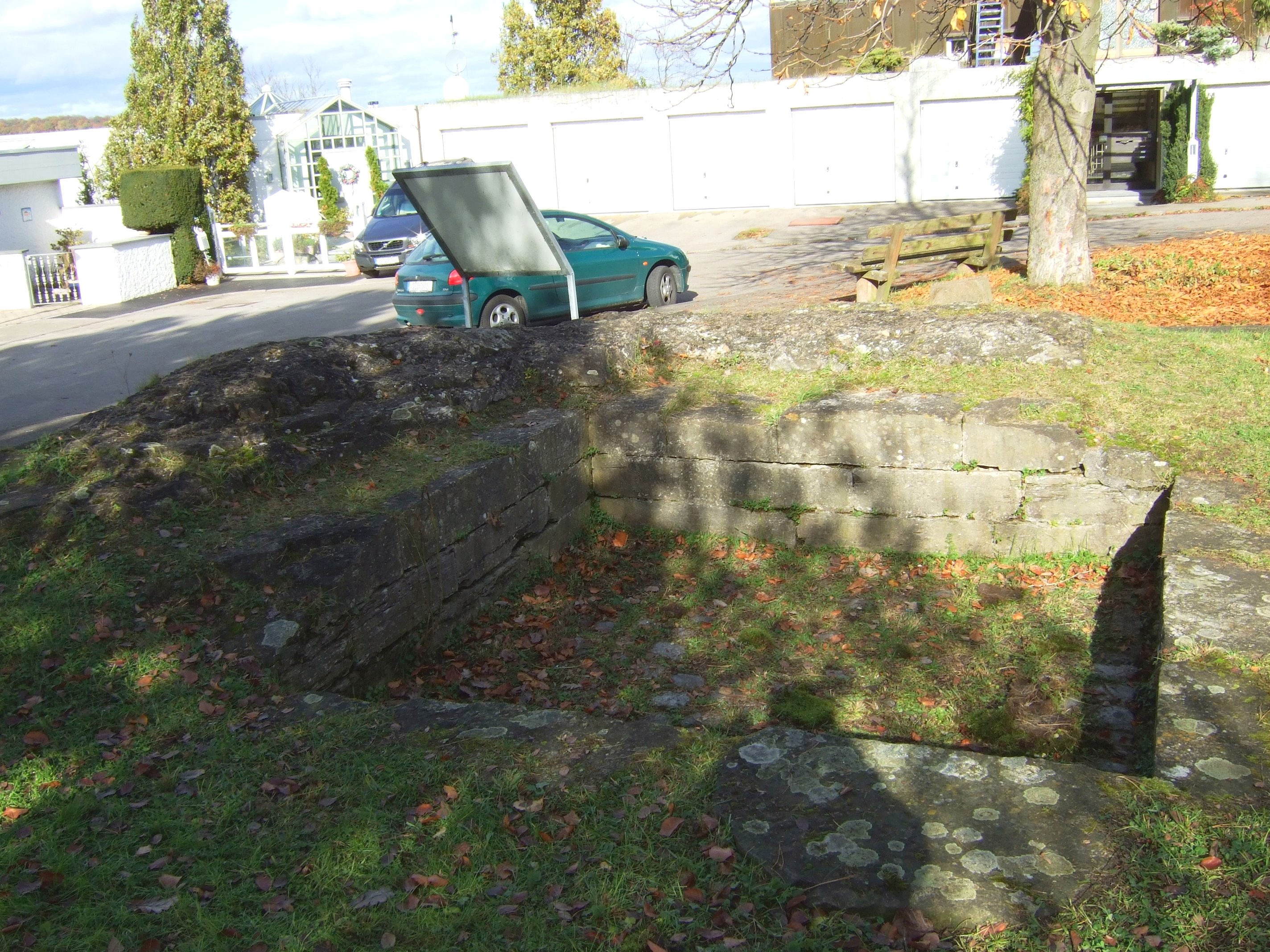 Mauerreste des Burgturms